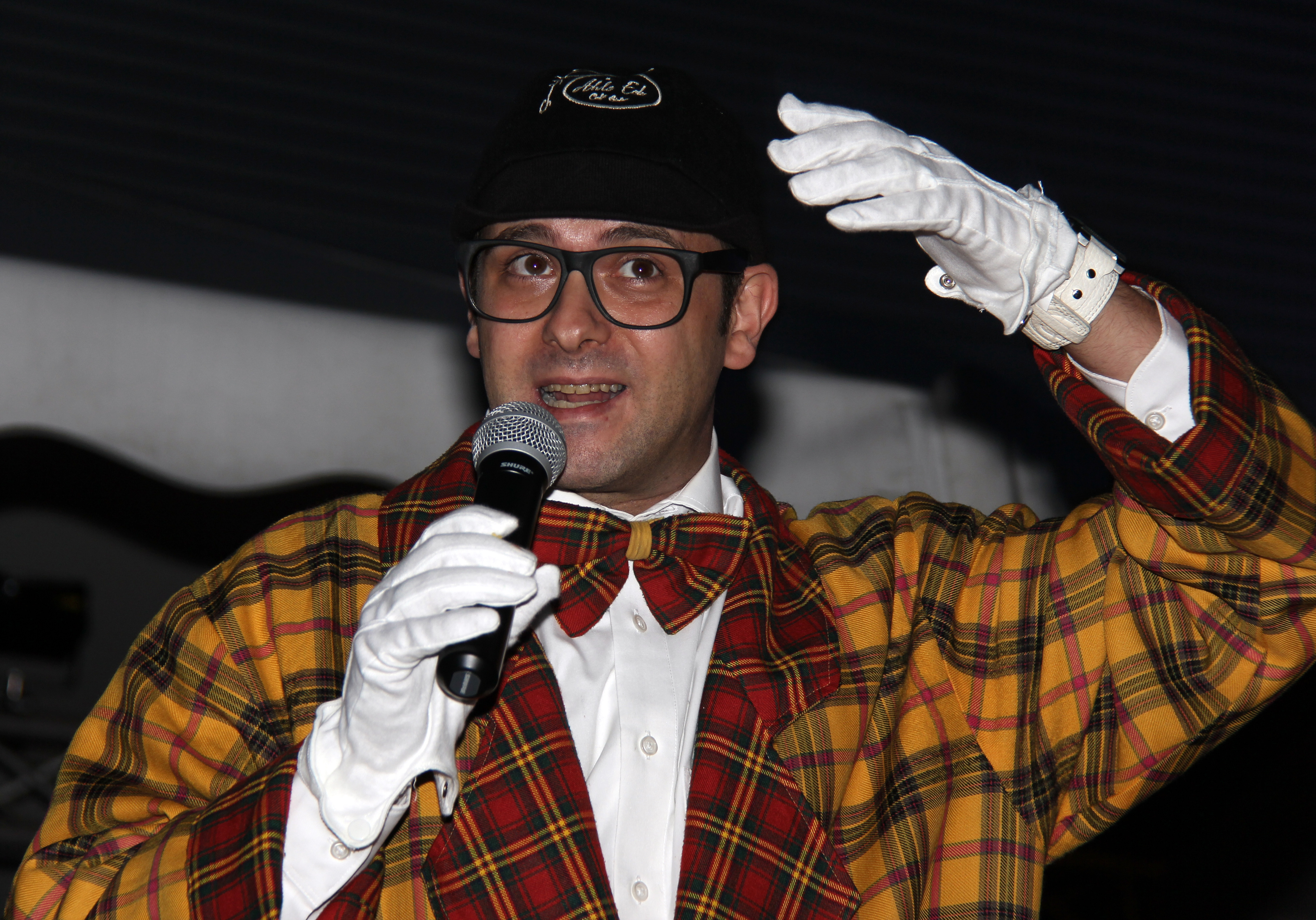 Marc Metzger, deutscher Komiker, auf einer Veranstaltung im September 2011